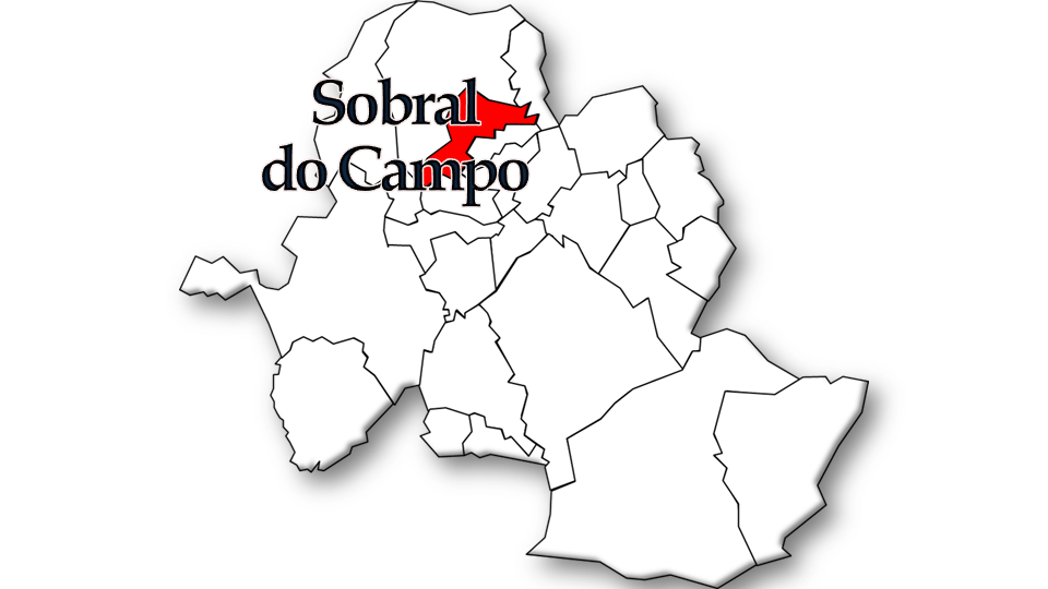 População